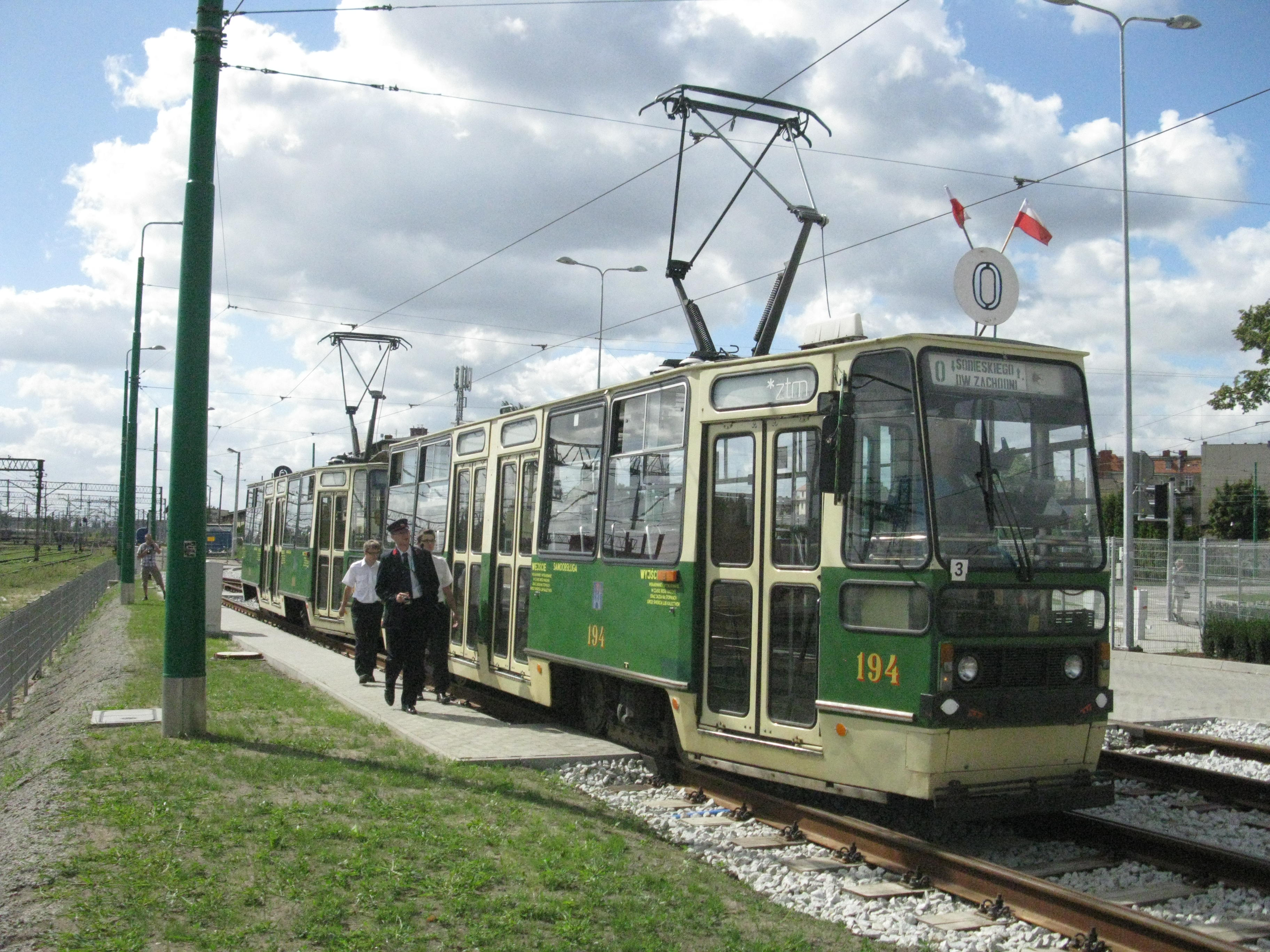 Stacja PST - Dworzec Zachodni, Konstal 105N